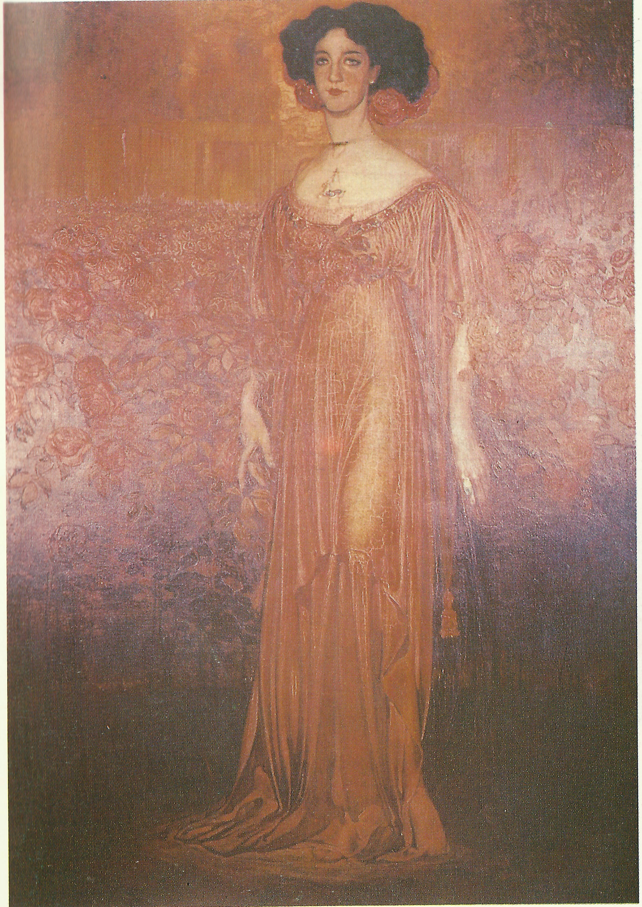 4. La hermana de las rosas, 1908, óleo sobre lienzo, 130 x 195 cm. (Museo Néstor).